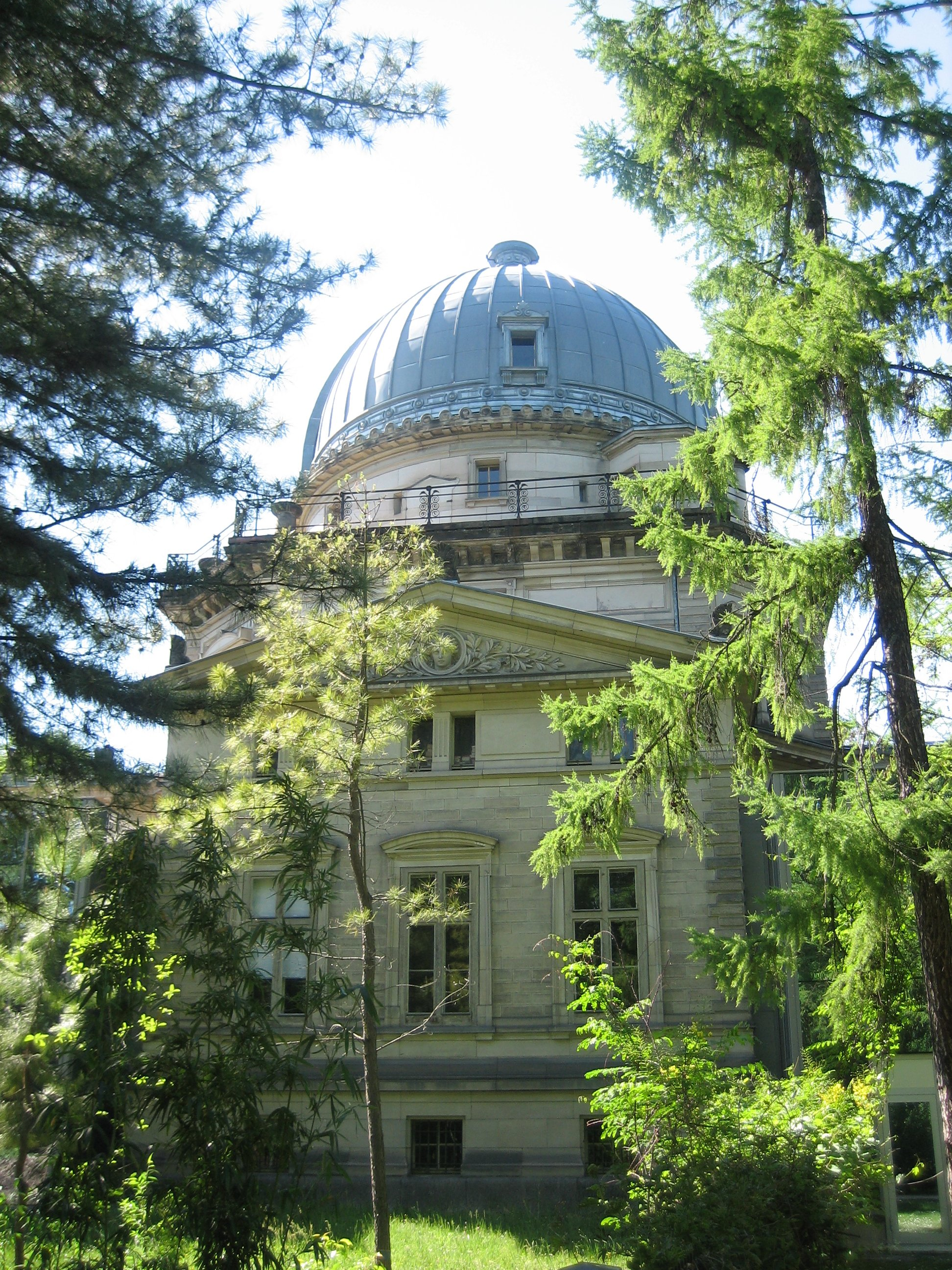 Observatoire de Strasbourg